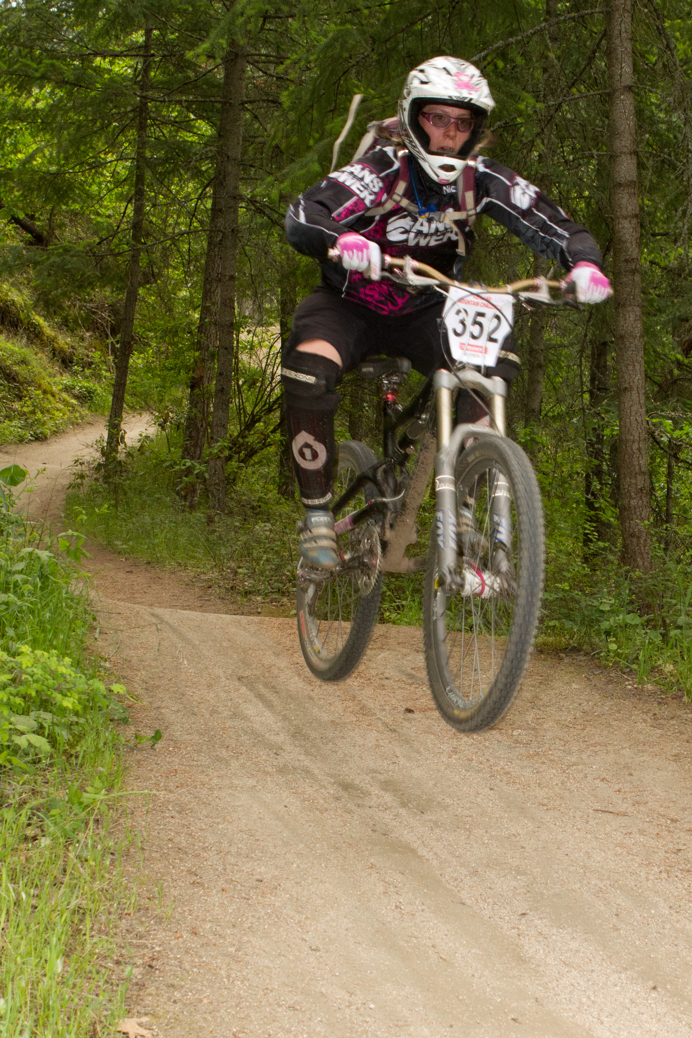 Mountain Biking